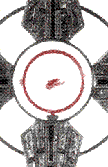 Cud eucharystyczny